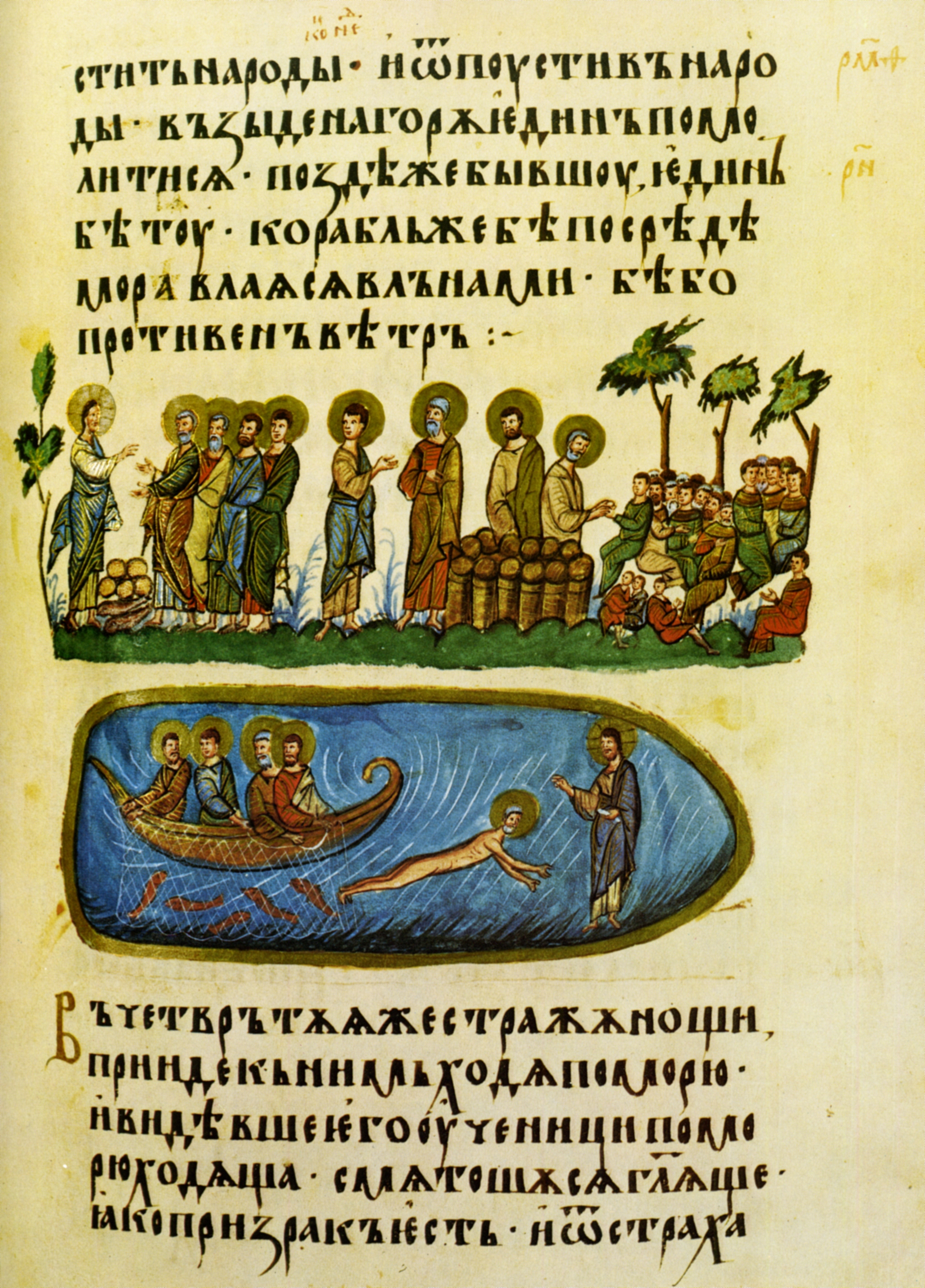 Четвероевангелие на цар Иван Александър, стр. 45; Matthew 14:15-31 Миниатюри: Чудото с петте хляба и двете риби (горе) Петър върви по водата към Исус (долу)